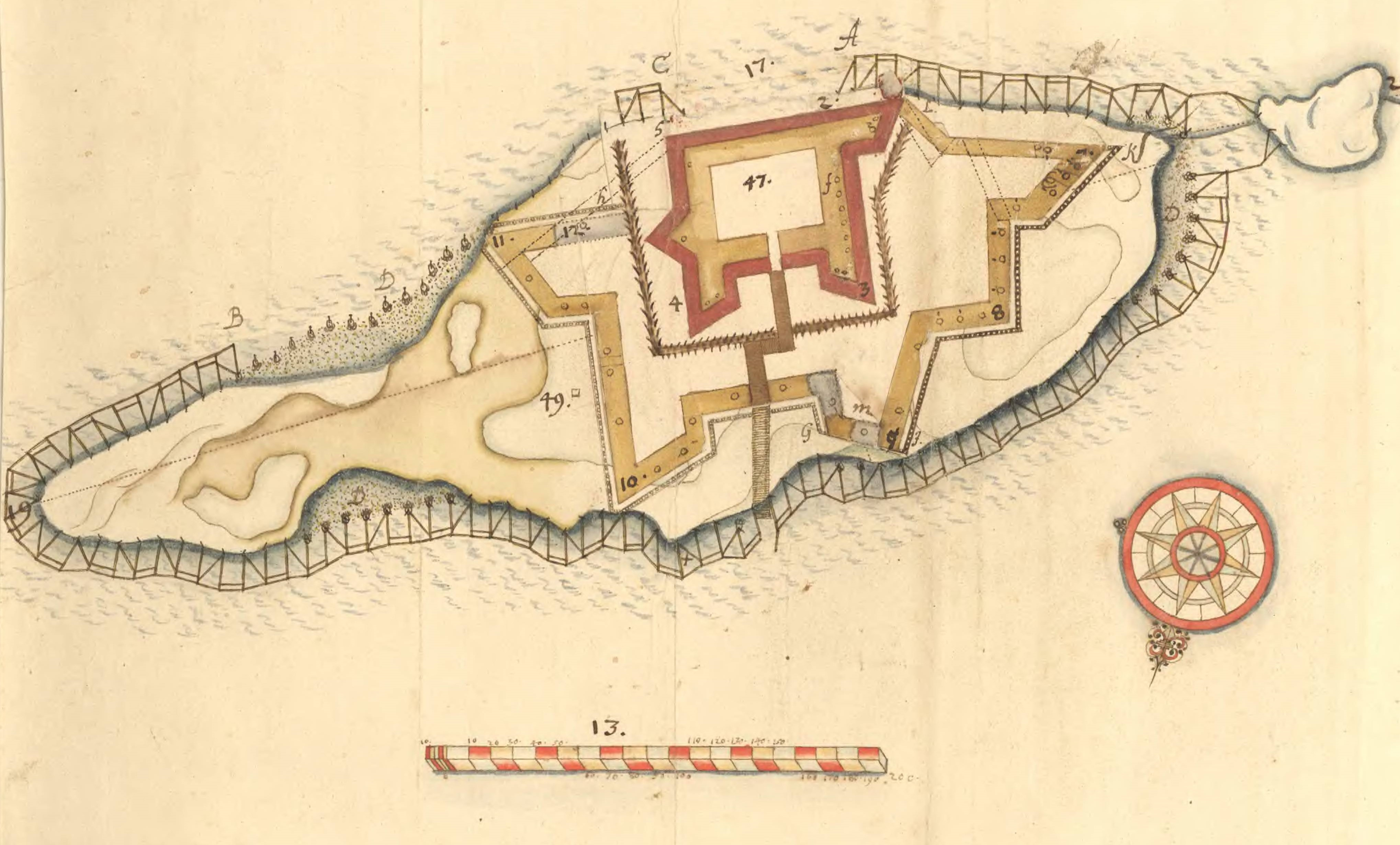 Ritning för Dalaö skans